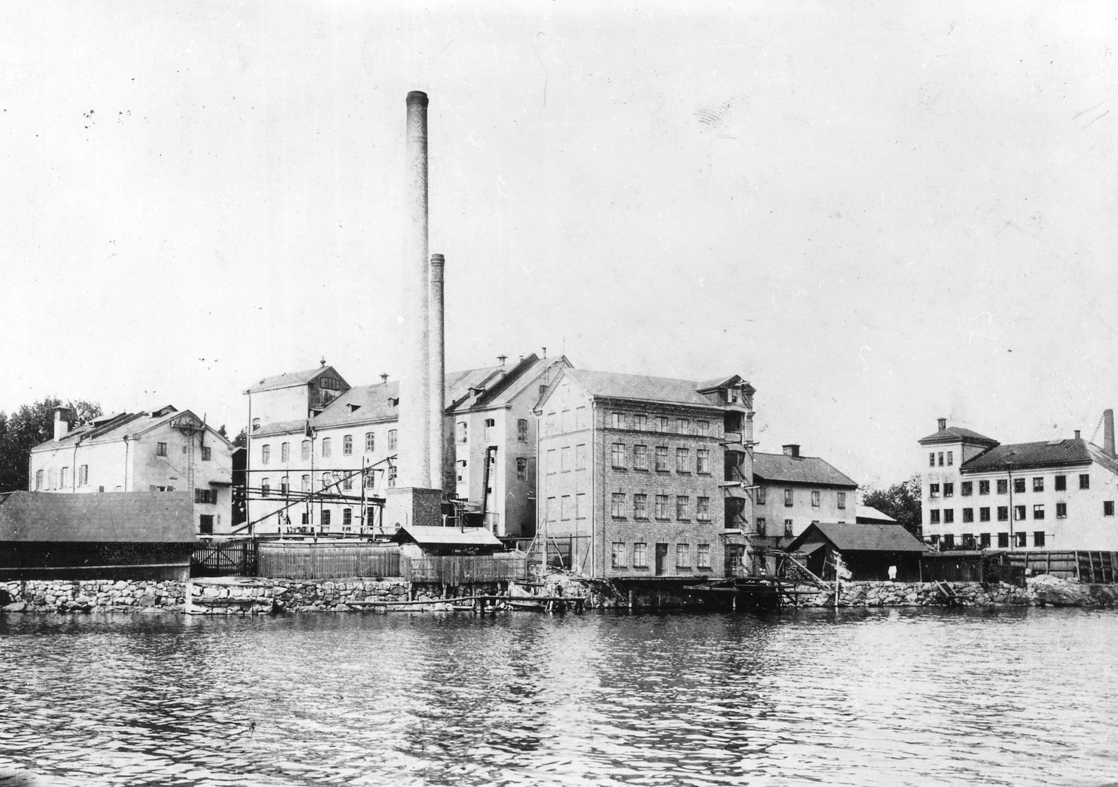 Traneberg ca 1900. Benmjölsfabriken Sandvik (f.d. glasbruk m.m). Byggnader fr. v; extraktionshus, benmjölsfabrik, kvarn, hus sammanbyggt med kvarnen samt stärkelsefabrik(?).